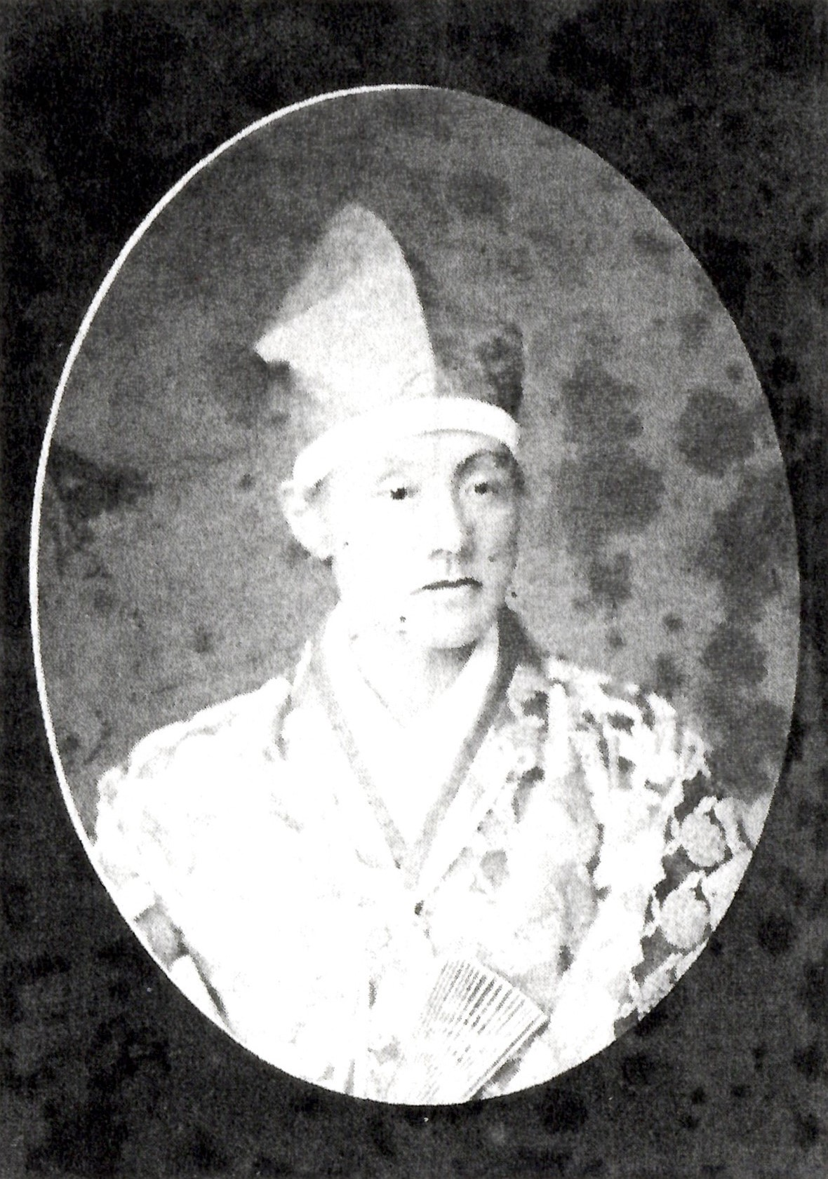 大岡忠敬の肖像写真。